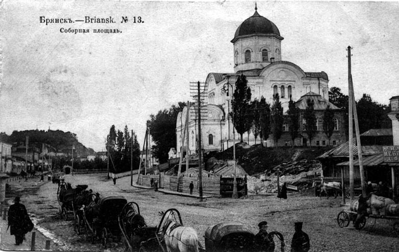 Брянск начала ХХ века. Соборная площадь.